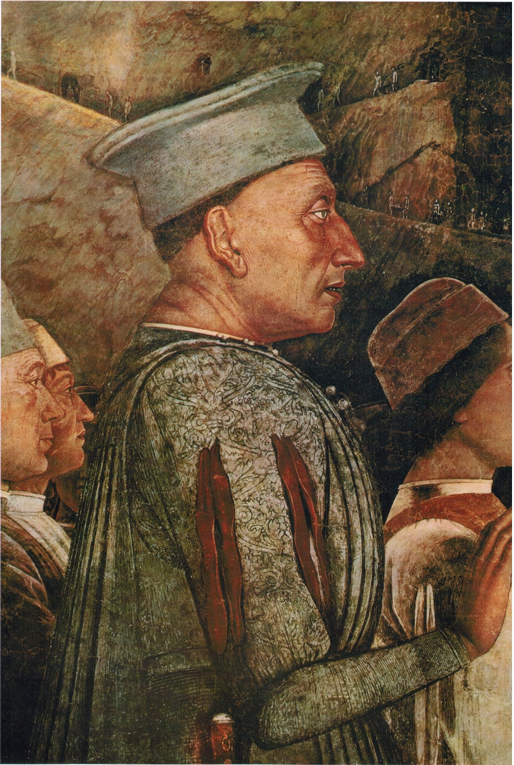 Lodovico Gonzaga